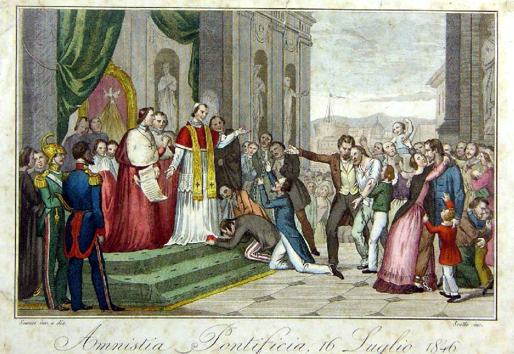 Celebrazione dell'amnistia politica concessa da Pio IX